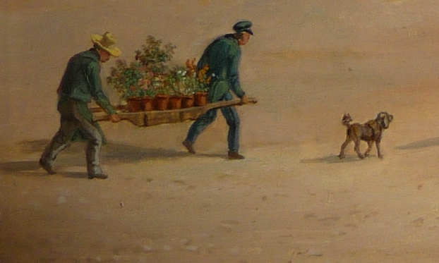 Gärtner mit Arbeitsschürzen transportieren wertvolle Kübelpflanzen.